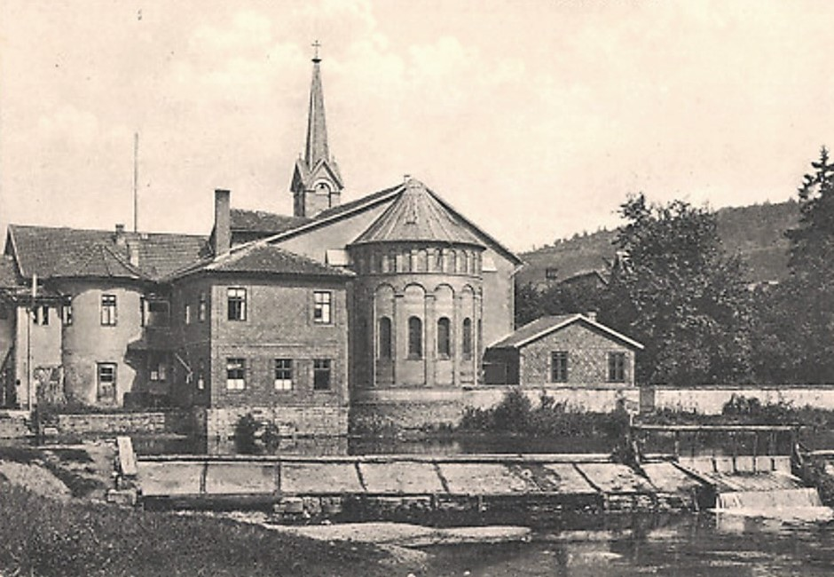 Katholische Kirche „Unbefleckte Empfängnis Mariens“ in Meiningen, erbaut 1881, abgerissen 1967. Blick von Westen über den Mühlgraben mit Brolle zum Chor.